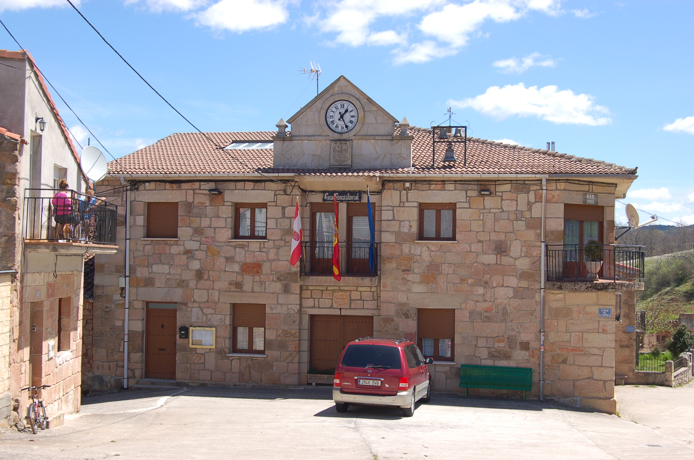 Casa consistorial de Cabezón de la Sierra